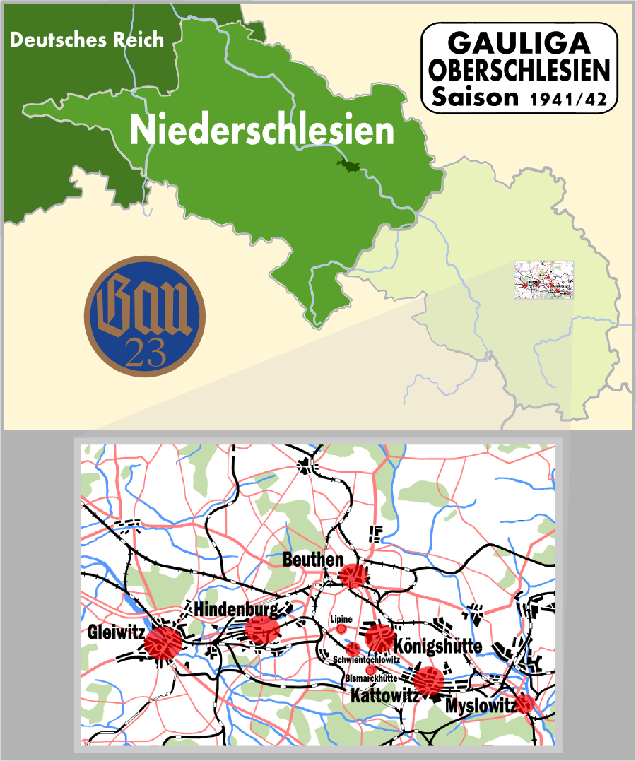 Spielorte der Gauliga Oberschlesien 1941/42.